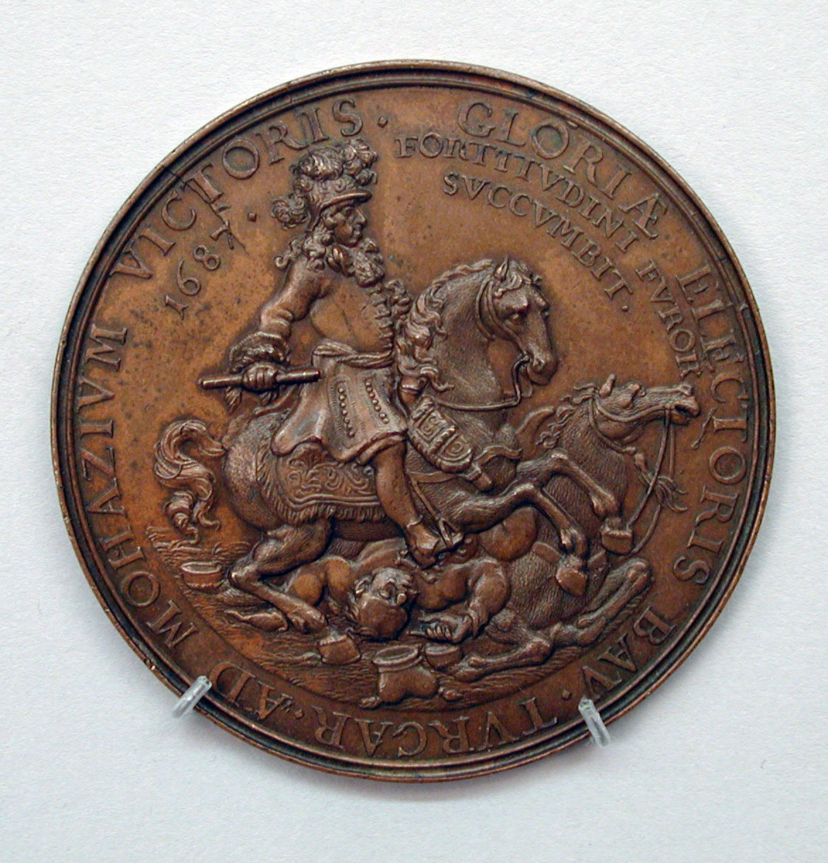 German; Medal; Medals and Plaquettes